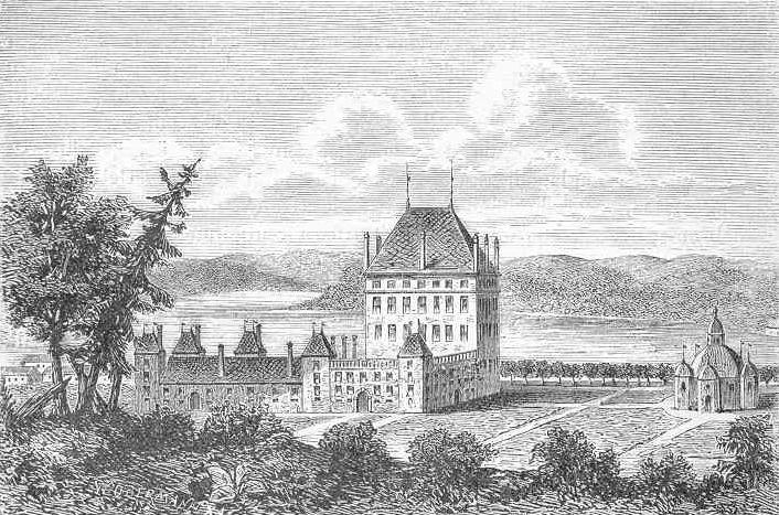 Slottet Bråborg, efter Erik Dahlbergs förlaga från sekelskiftet 1700. Avbildning i "Sveriges historia III", skriven av Oskar Alin, tryckt i Stockholm 1889, sidan 442.